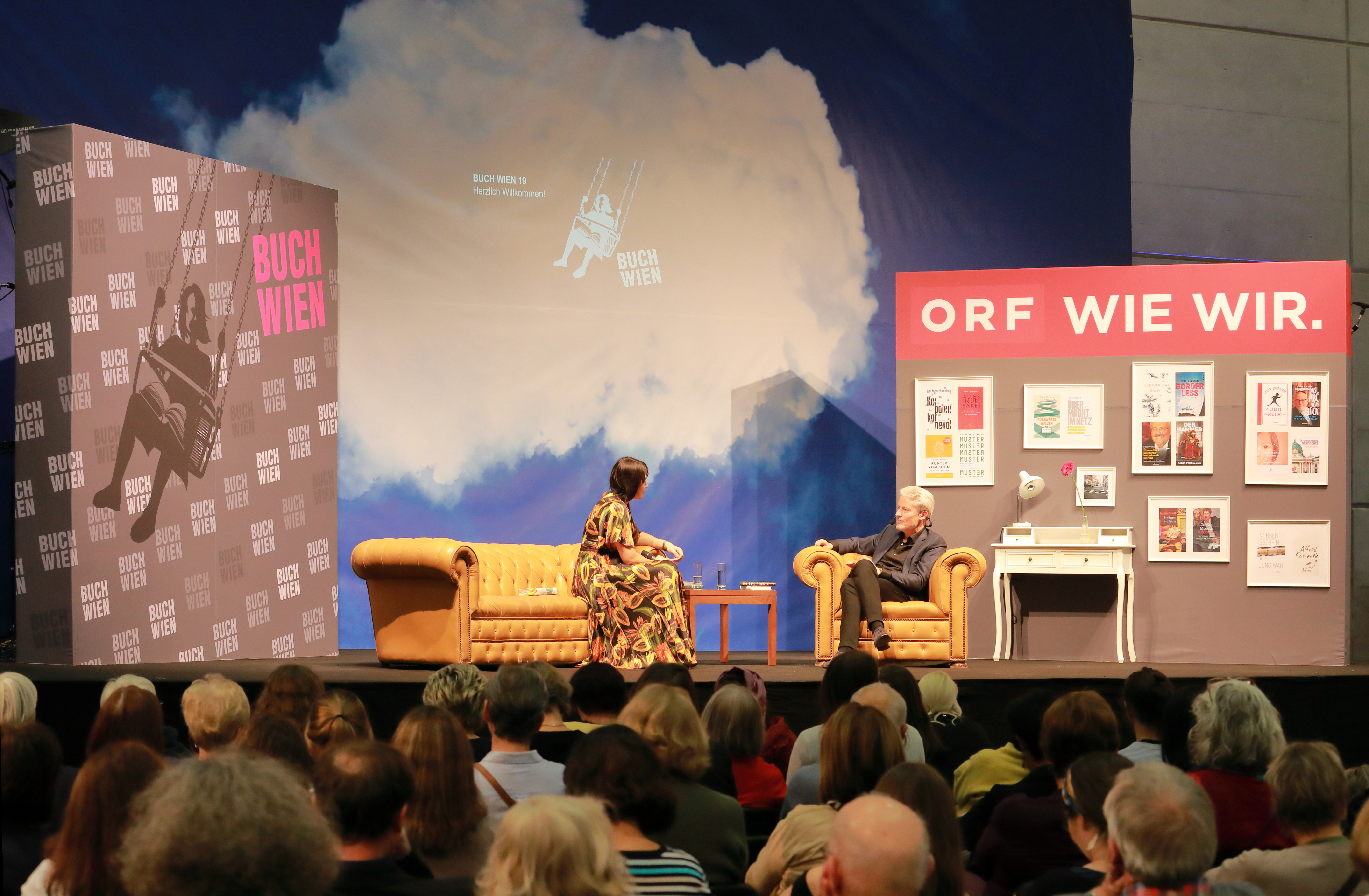 Die ORF-Bühne der Buch Wien 19. Auf dem Podium die österreichische Schriftstellerin Vea Kaiser und der Moderator Florian Scheuba.